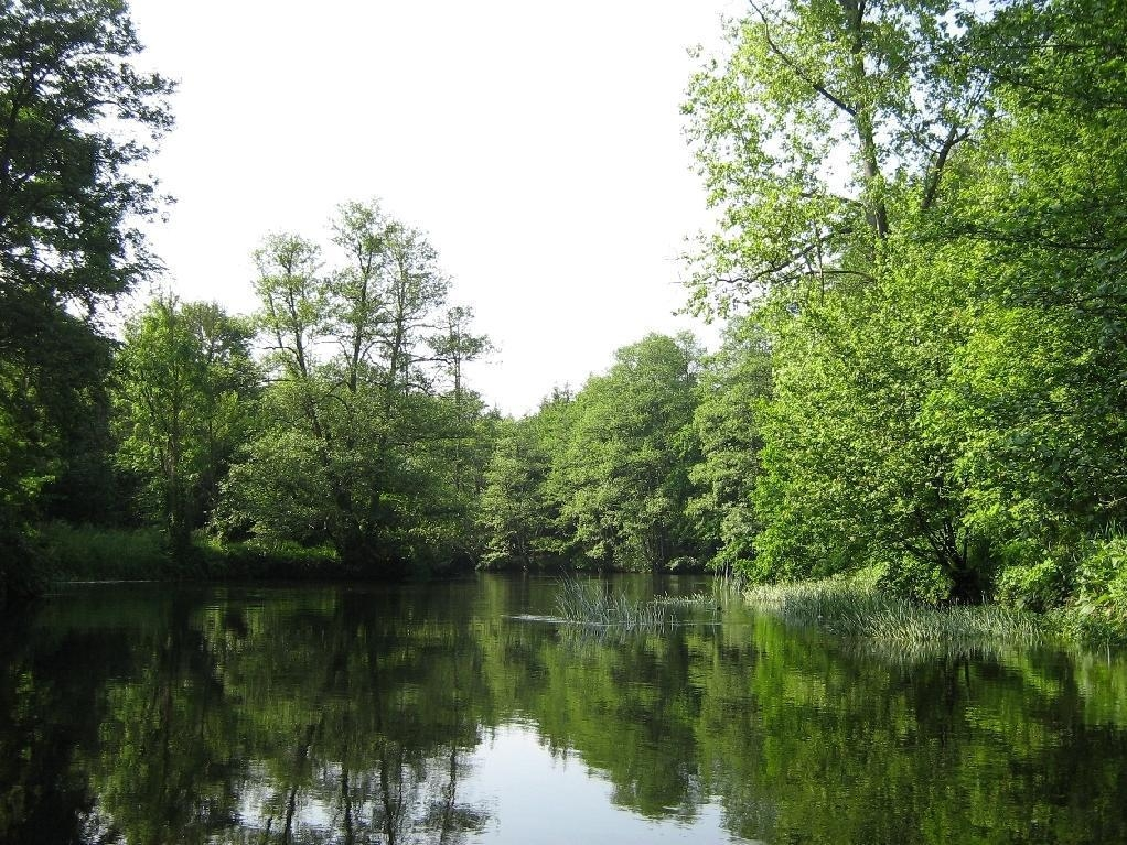 die Rega, ein Fluss in Hinterpommern, Woiwodschaft Westpommern (Nordwestpolen).